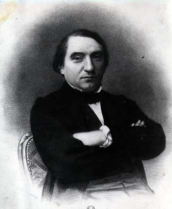 Ernest Renan